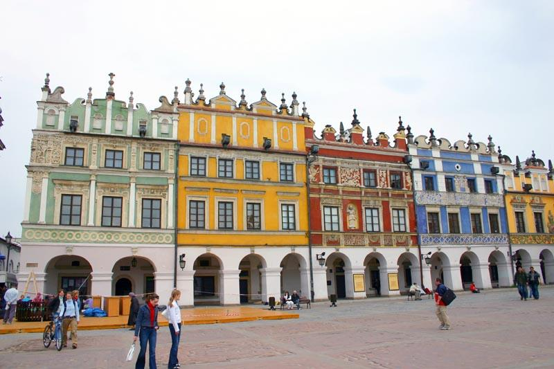 Zamosc (Poland)